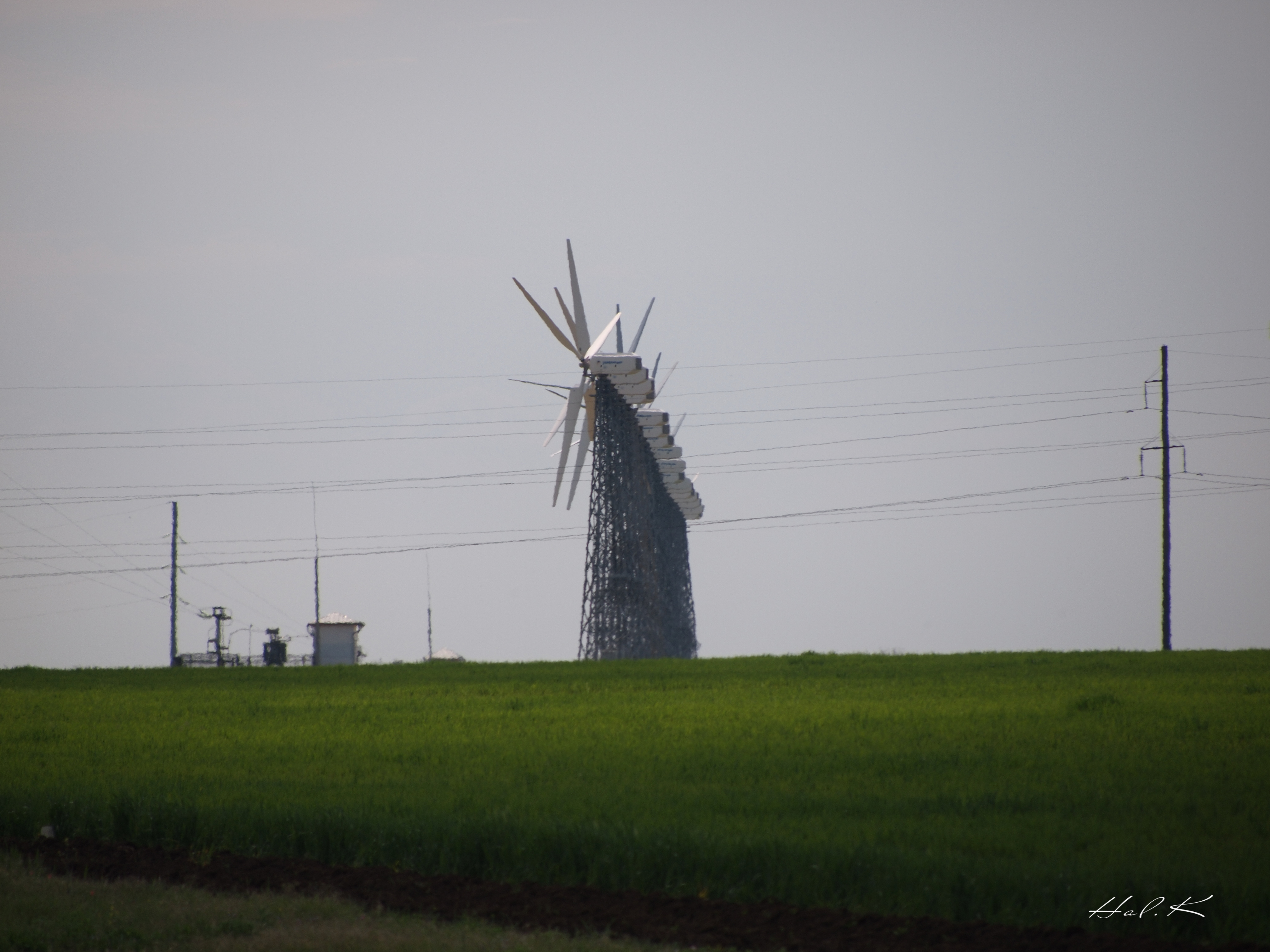 Wind Farm